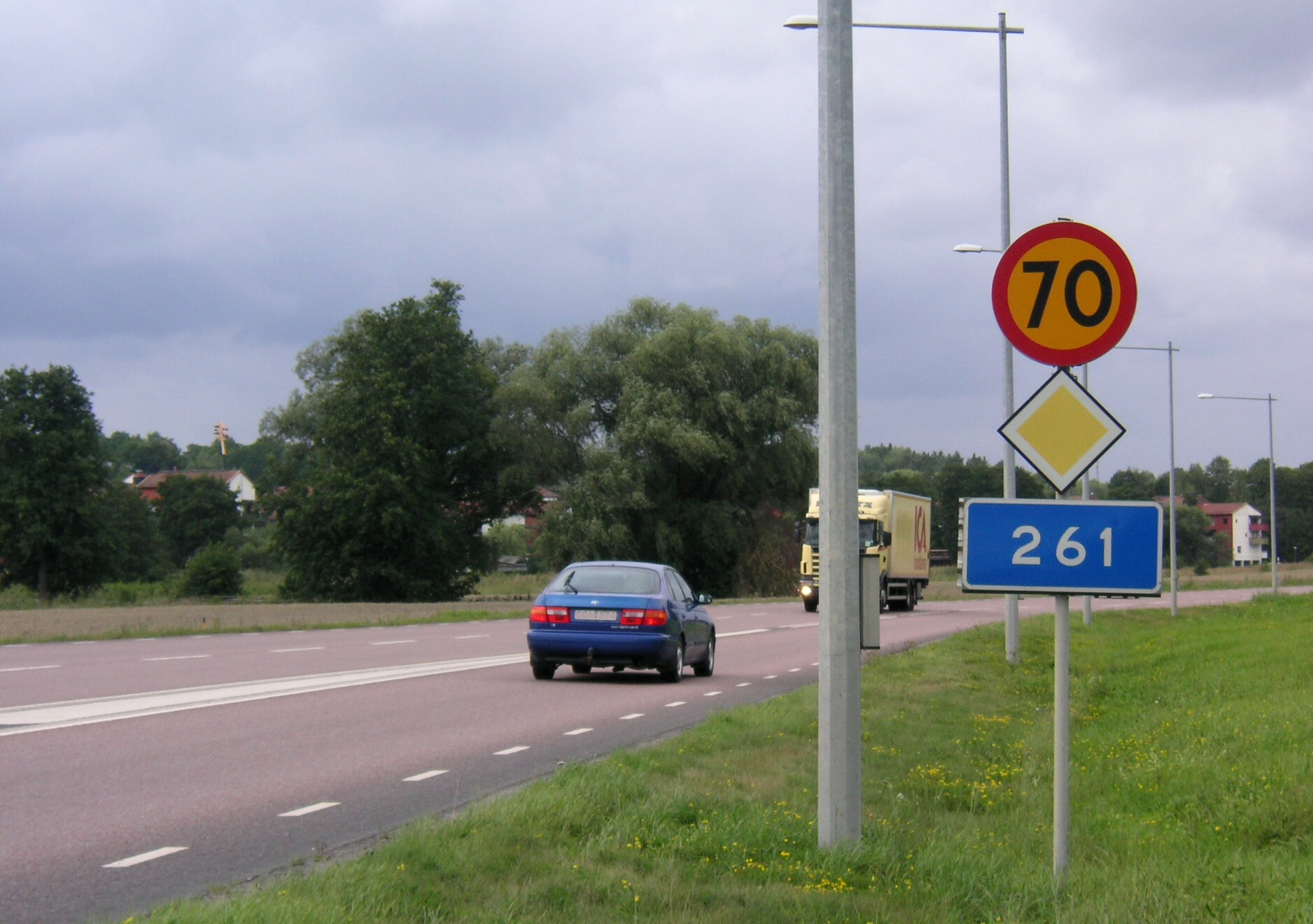 Ekerövägen, länsväg 261, på Ekerö strax före Tappström